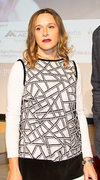 Valeria Parrella, scrittrice italiana